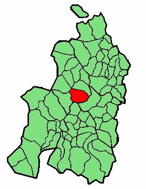 aipaturiko udalerriaren kokapena Nafarroa Beherean